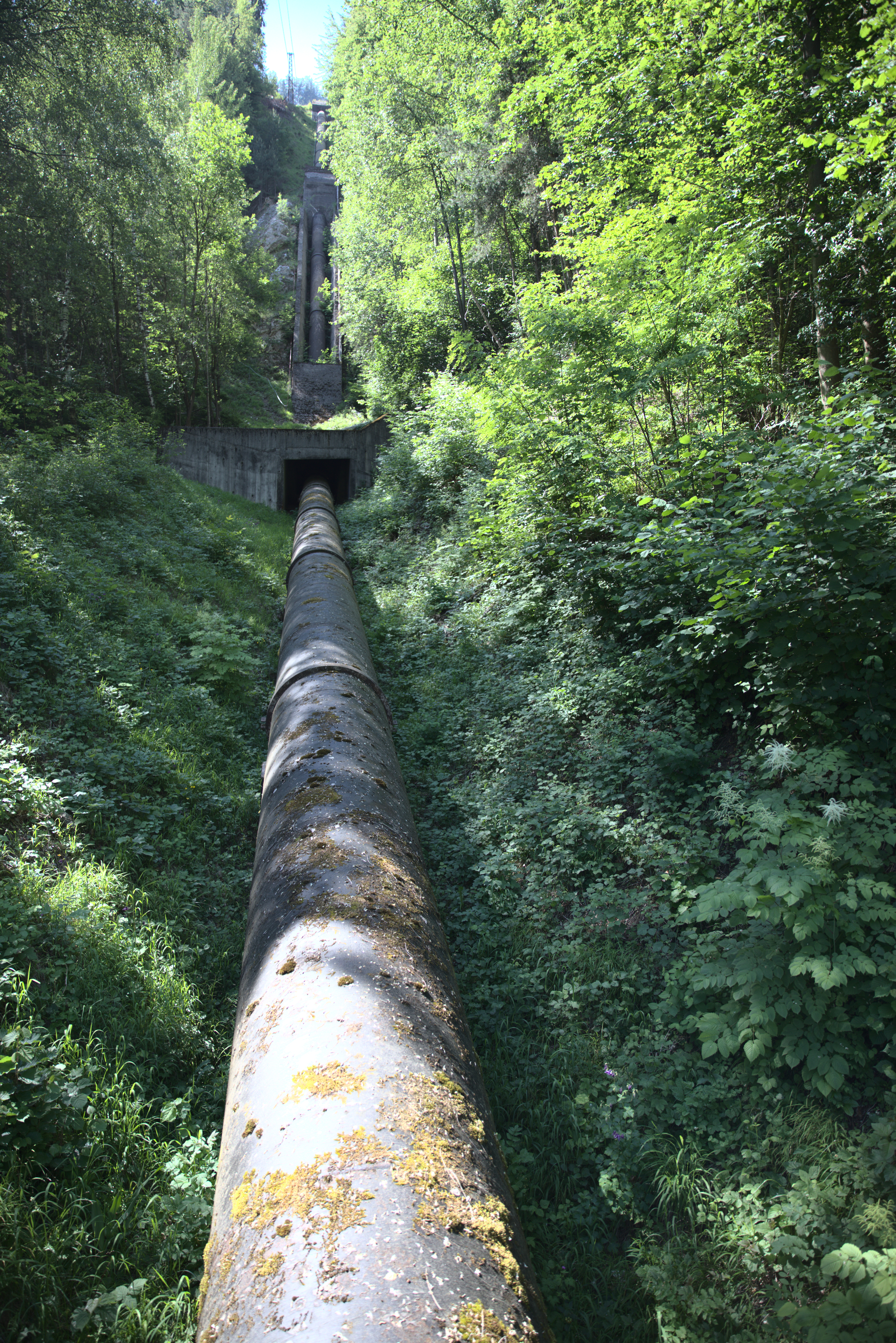 Conduite forcée du Tilleret, prise d'eau à Saint Jean d'Arves. Centrale Hydroélectrique à Saint Jean de Maurienne